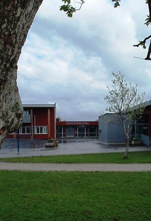 Hårberg skole (Haarberg elementary school) of Ørland, Norway